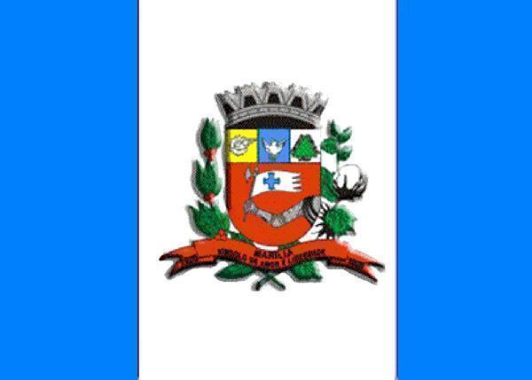 Bandeira nova do município de Marília, São Paulo, Brasil